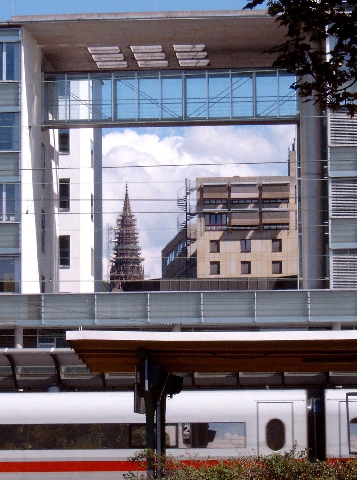 Windfenster im Freiburger Hauptbahnhof mit Verbindungssteg